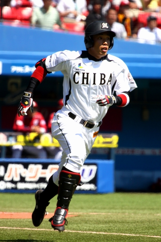 日本のプロ野球 千葉ロッテマリーンズ 加藤翔平選手